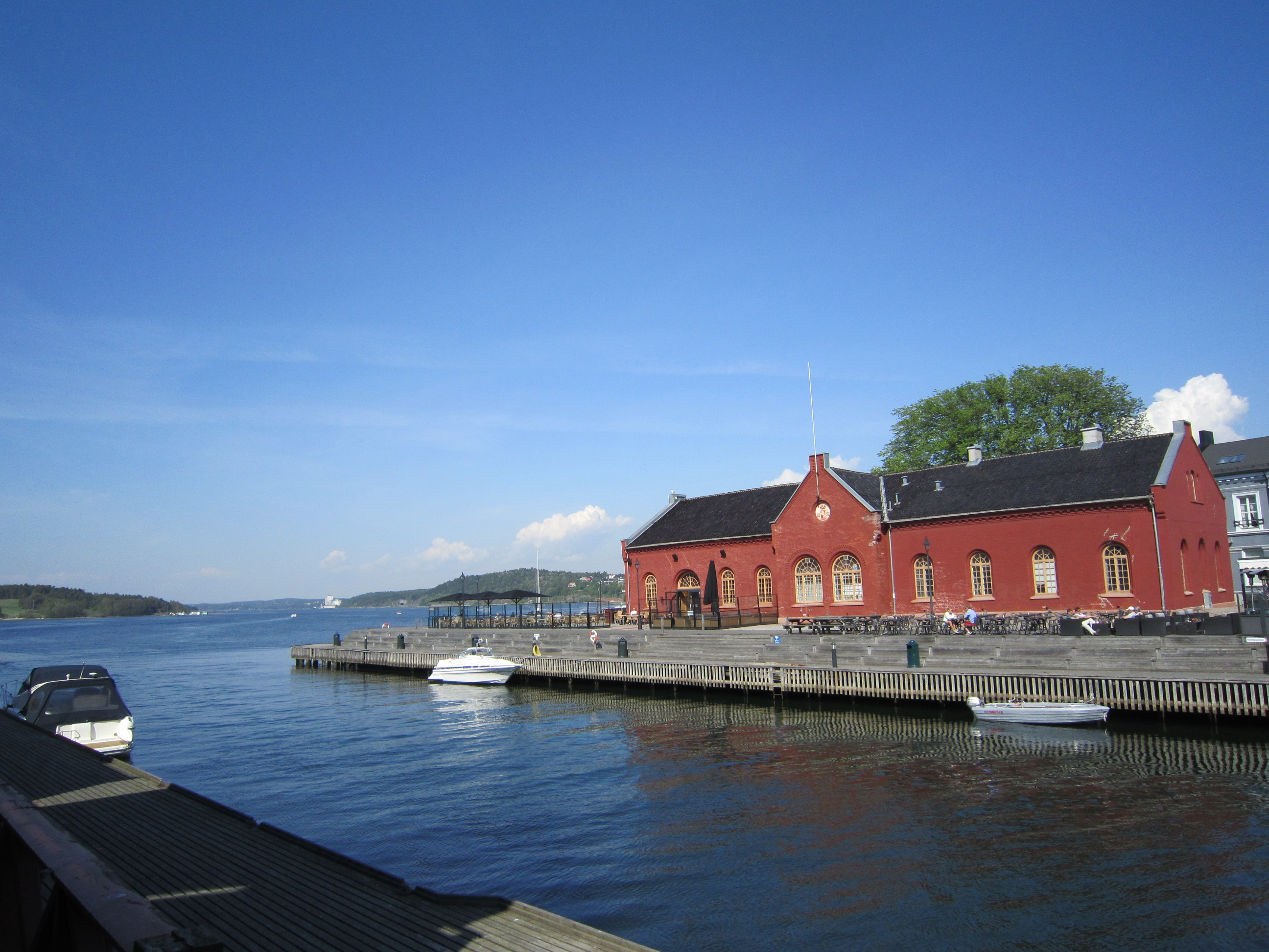 Moss fra Jeløya der kanalen munner ut i Mossesundet